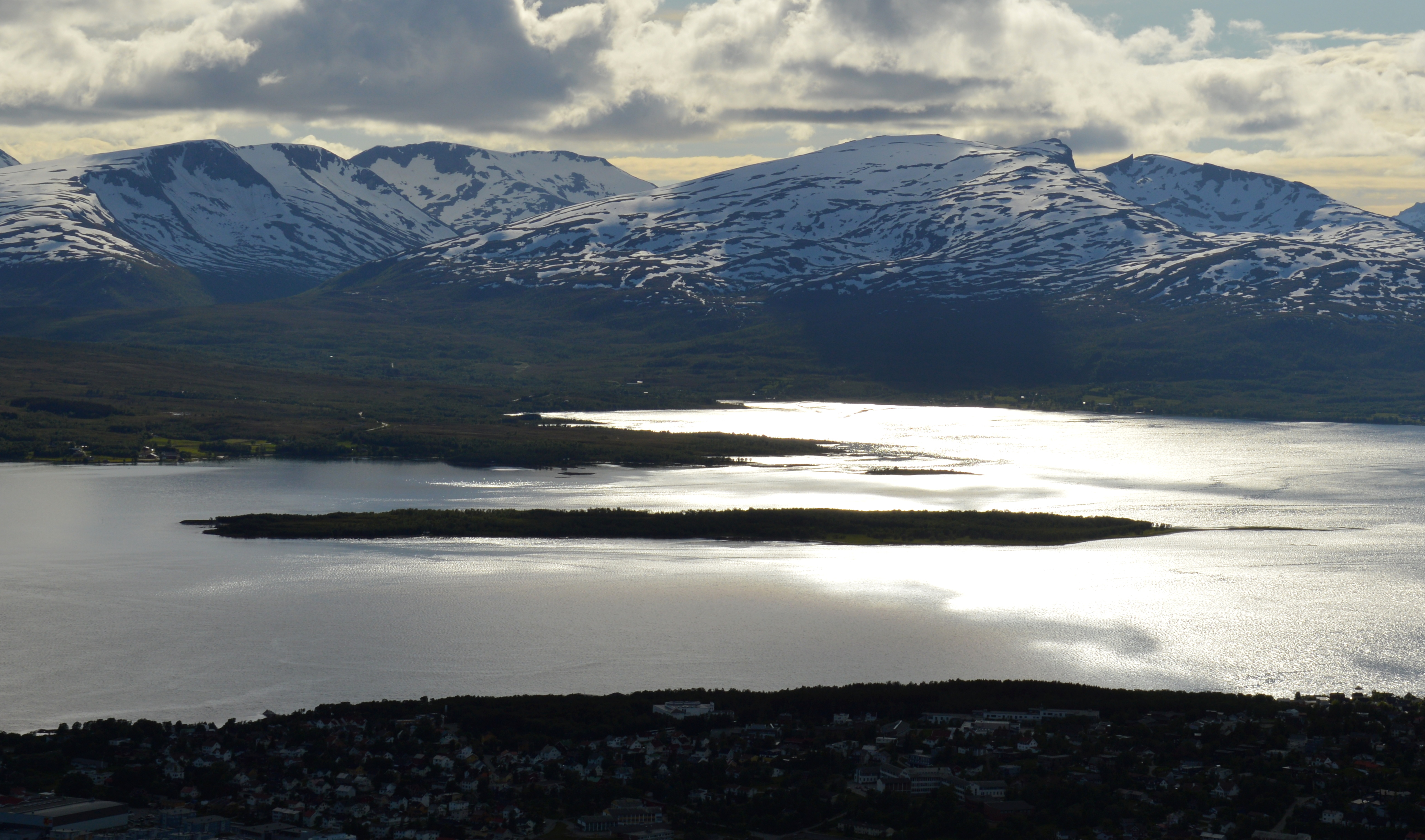 Store Grindøya bei Tromsø